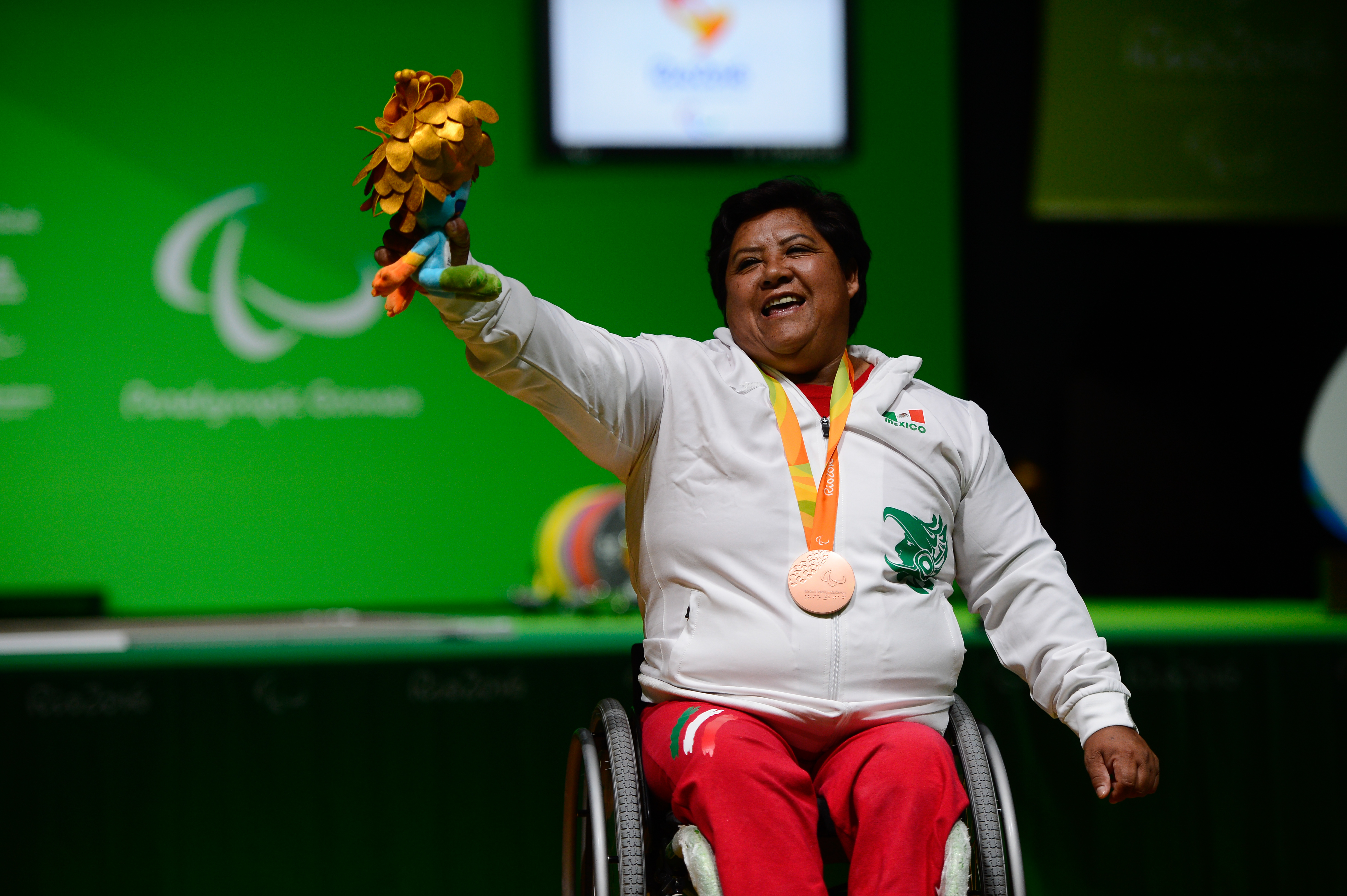 Rio de Janeiro - Catalina Diaz Vilchis, do México, bronze, no pódio do levantamento de peso, categoria até 86 kg, nos Jogos Paralímpicos Rio 2016 (Fernando Frazão/Agência Brasil)